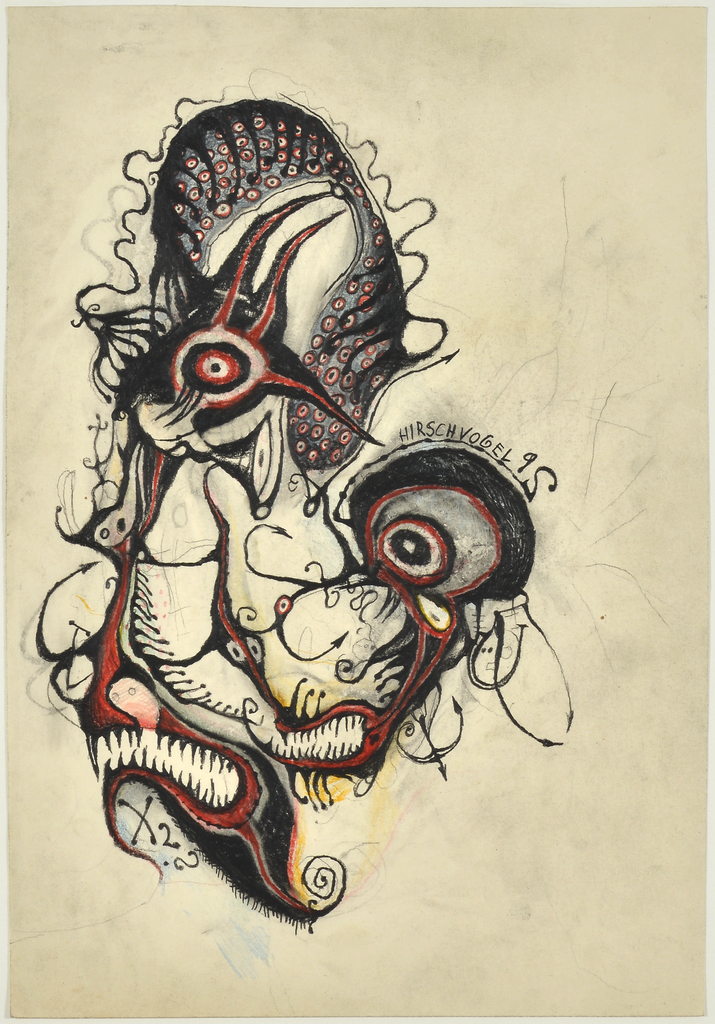 Zeichnung 1992